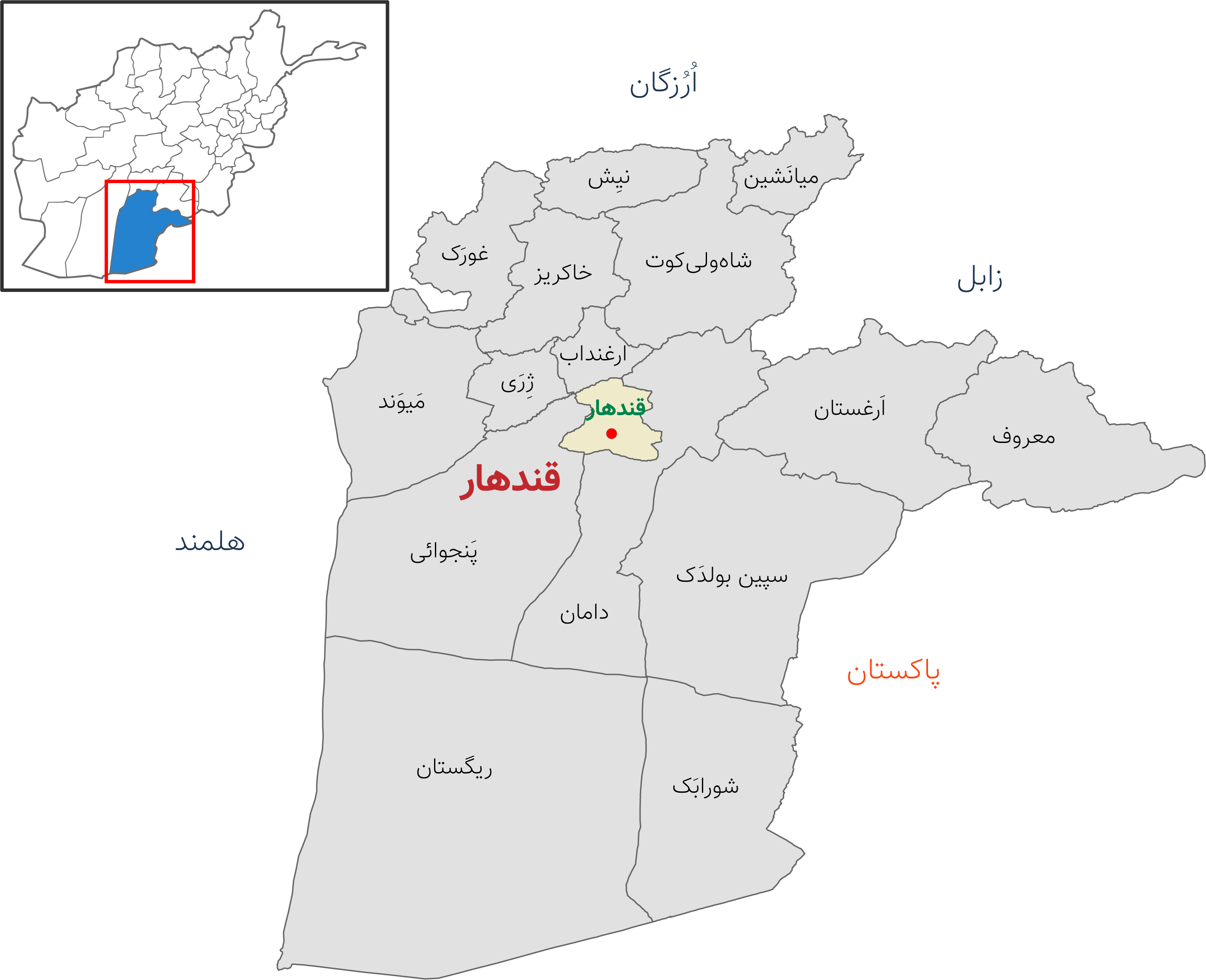 نقشه ولایت قندهار